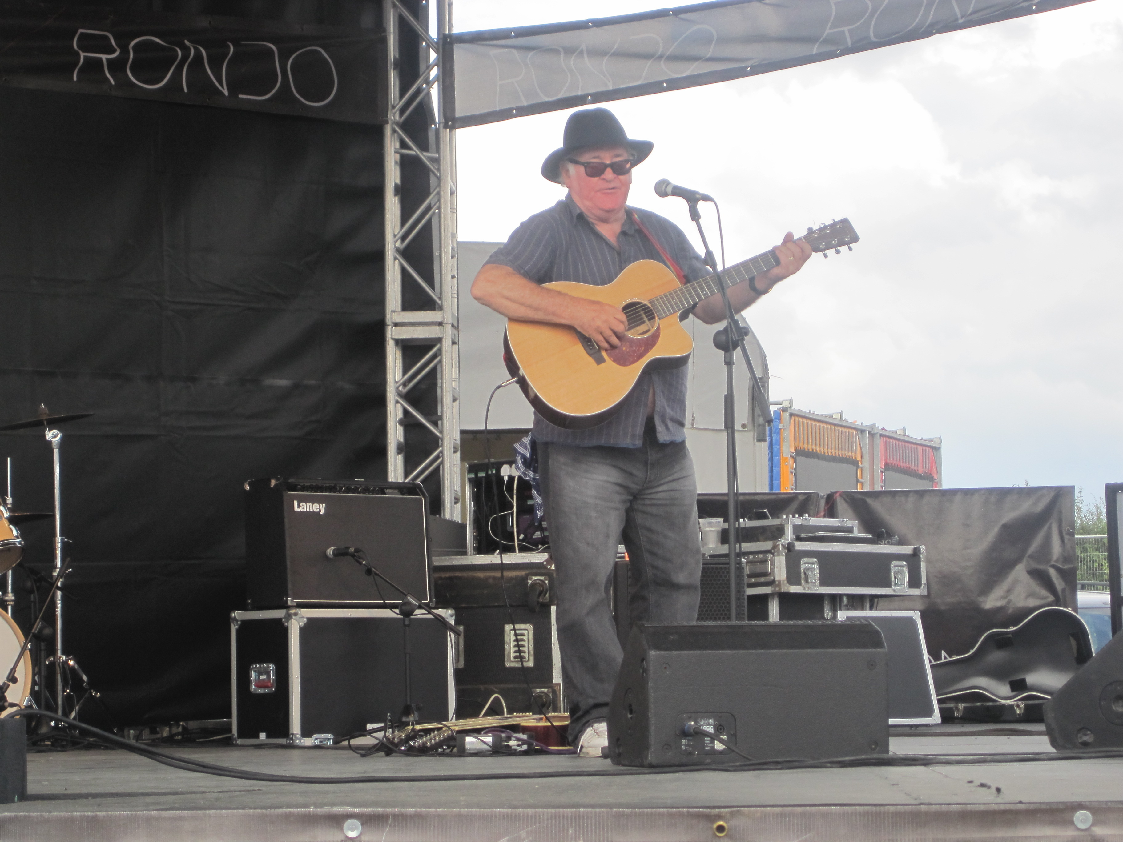 Meic Stevens yn Eisteddfod Wrecsam, 2011.